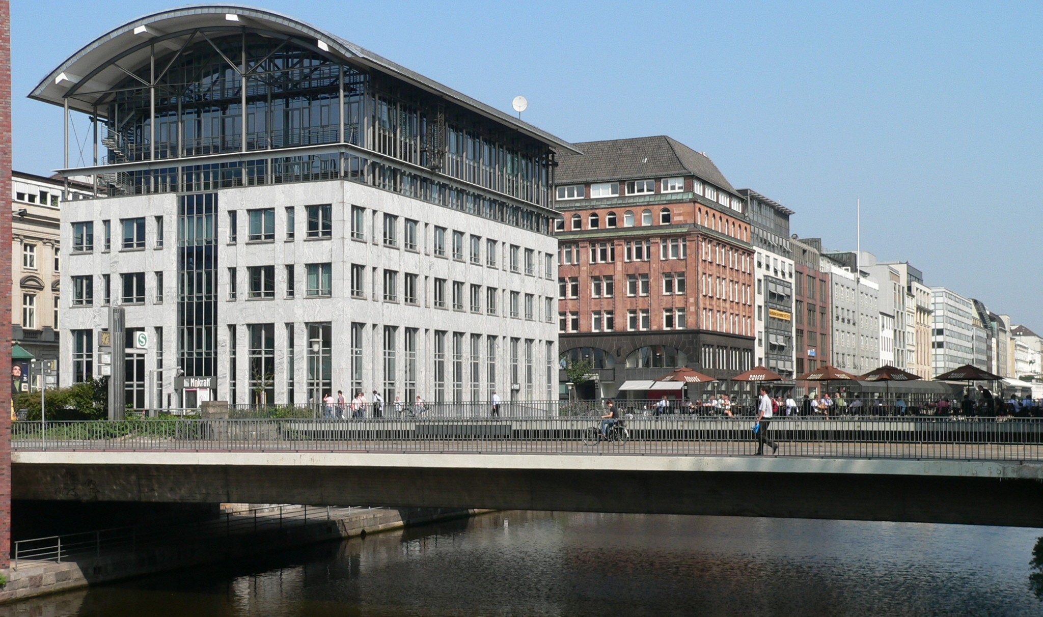 Neuer Wall Hamburg, Rückseite am Alsterfleet mit der Graskellerbrücke.